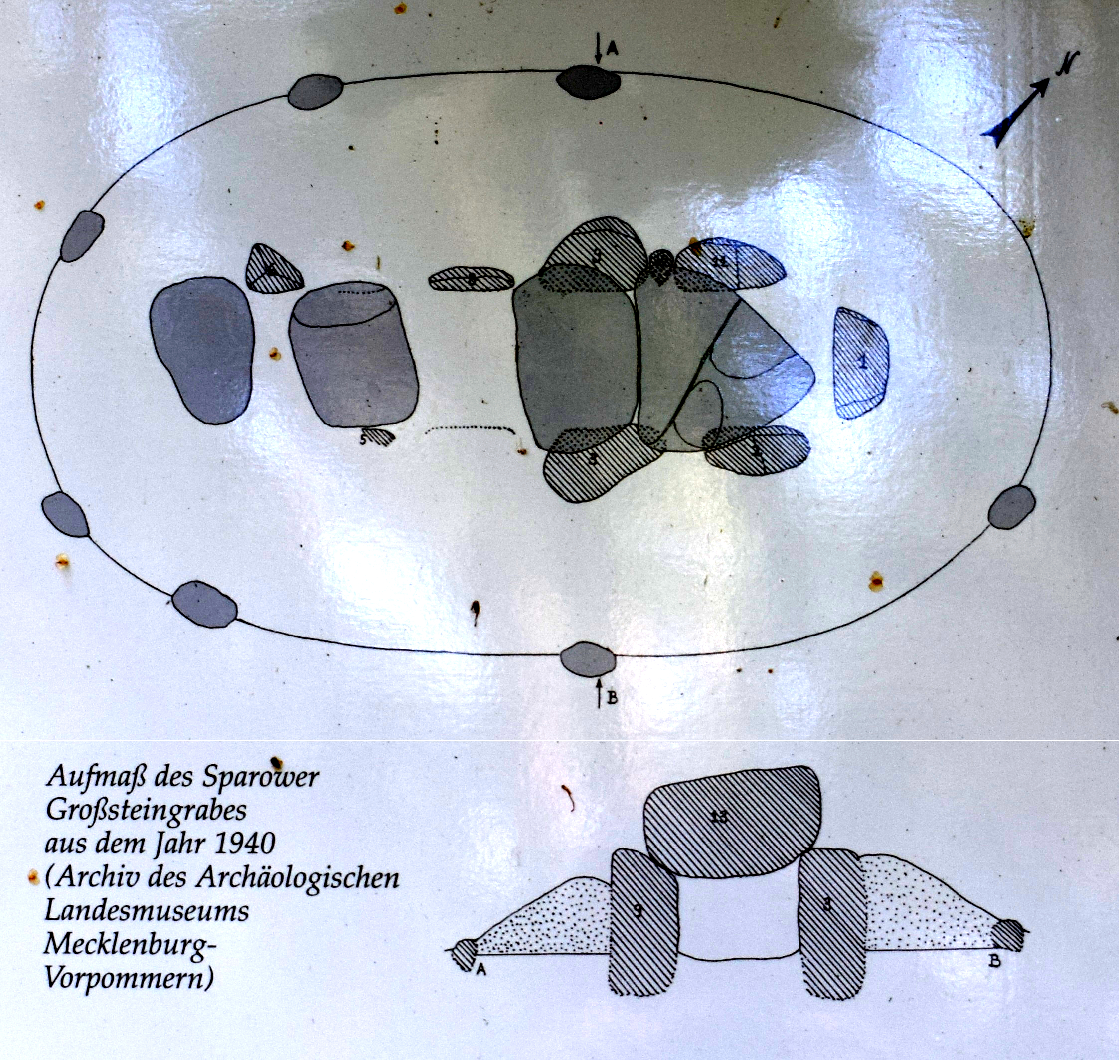 Grundriss des Großsteingrabs Sparow auf der Informationstafel vor Ort